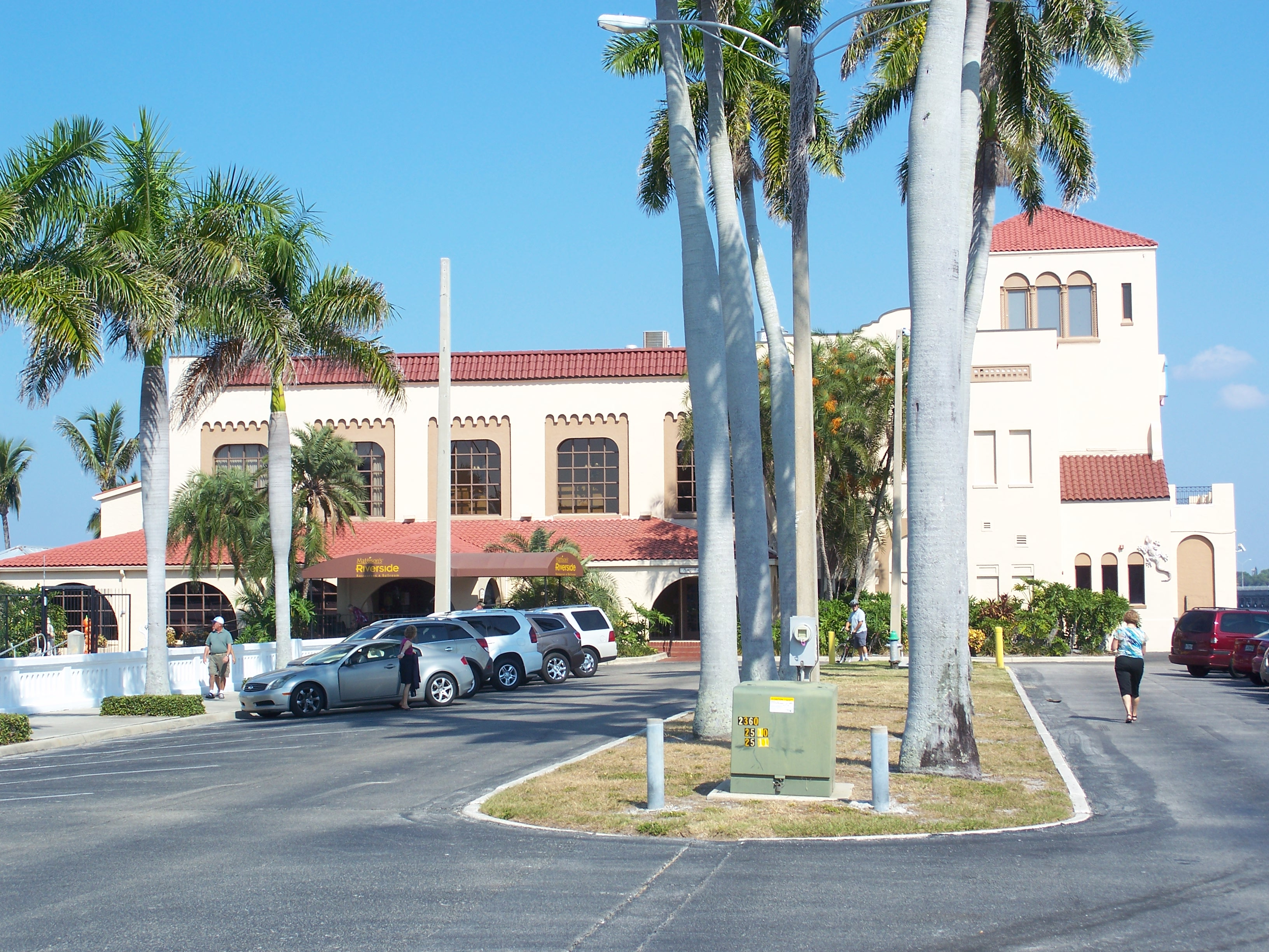 Bradenton, Florida: Memorial pier